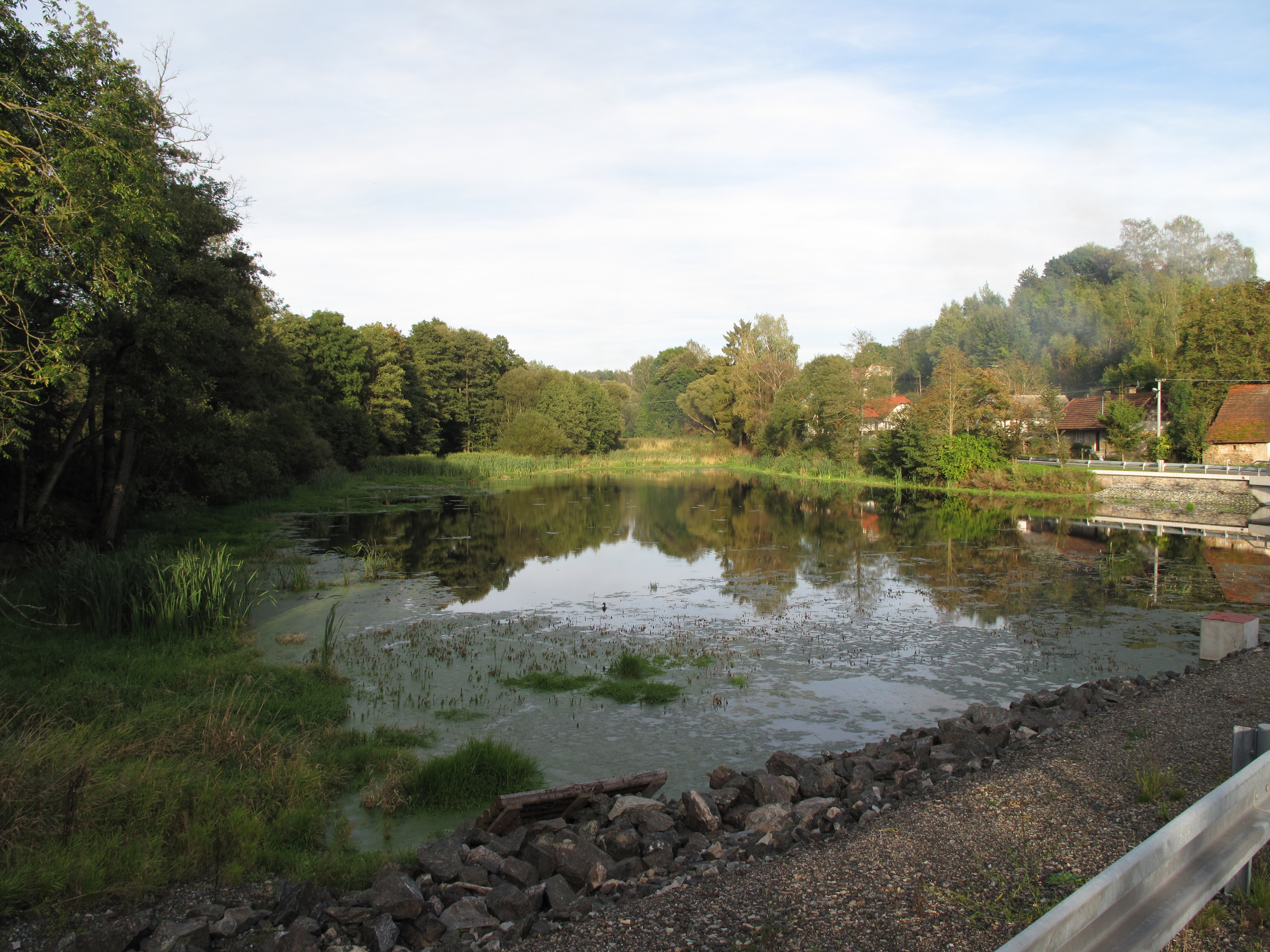 Rybník v Čestíně. Okres Kutná Hora, Česká republika.